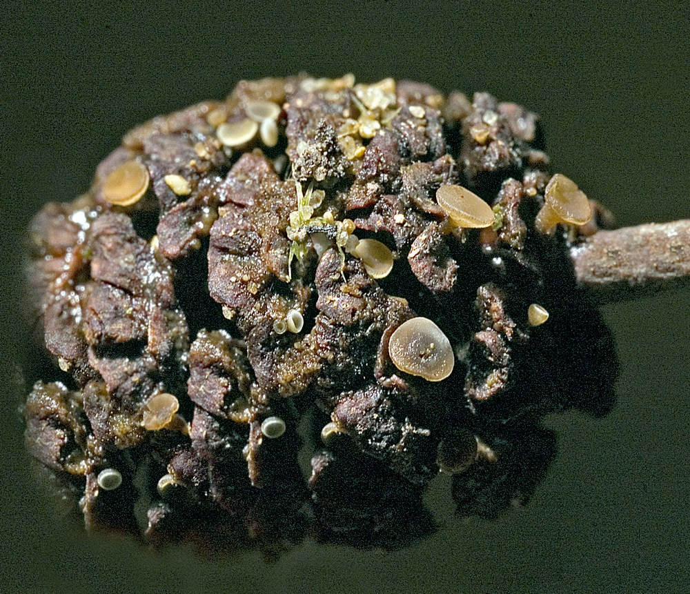 Erlenzäpfchen-fruchtbecherling (Ciboria viridifusca)